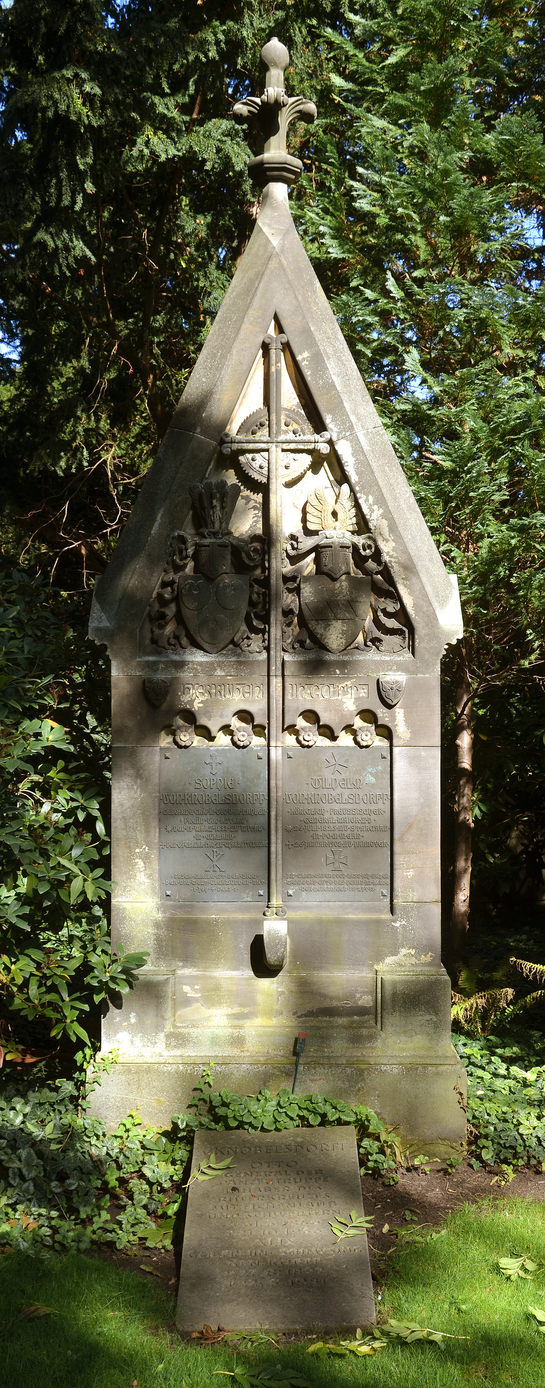 Familien-Grabmal des Königlich Preußischen Generalmajors Wilhelm von Knobelsdorff (1826-1908) und der Sophie, geborene Gräfin von der Pahlen, Freiin von Astrau (1833-1910), und am Fuß des Standmals die Grabplatte von Otto von Knobelsdorff (1886-1966) „General der Panzertruppe und Inhaber des Ritterkreuzes mit Eichenlaub und Schwertern“ sowie der Alix, geborene Freiin von Schmusing, genannt Korff (1892-1981) ...